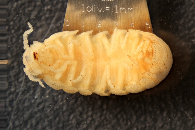 Tylos punctatus ventral view